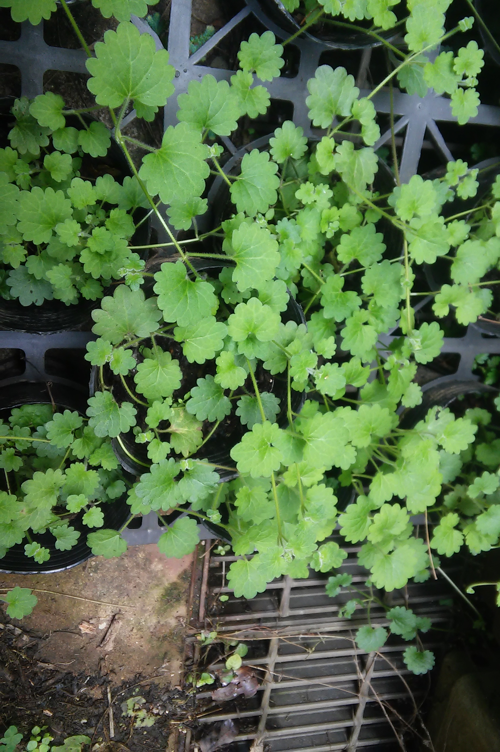 中文（台灣）: 鈴木草照片